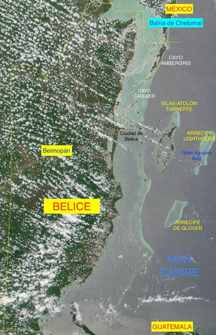 Image of Belize with geographic names, imagen de Belice con nombres geográficos